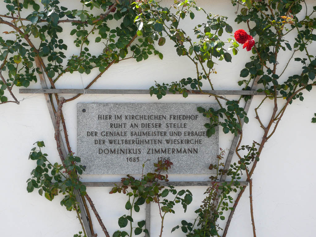 Stiftskirche St. Johannes d. T. (Steingaden): Grab des Dominikus Zimmermann, Baumeister der Wieskirche